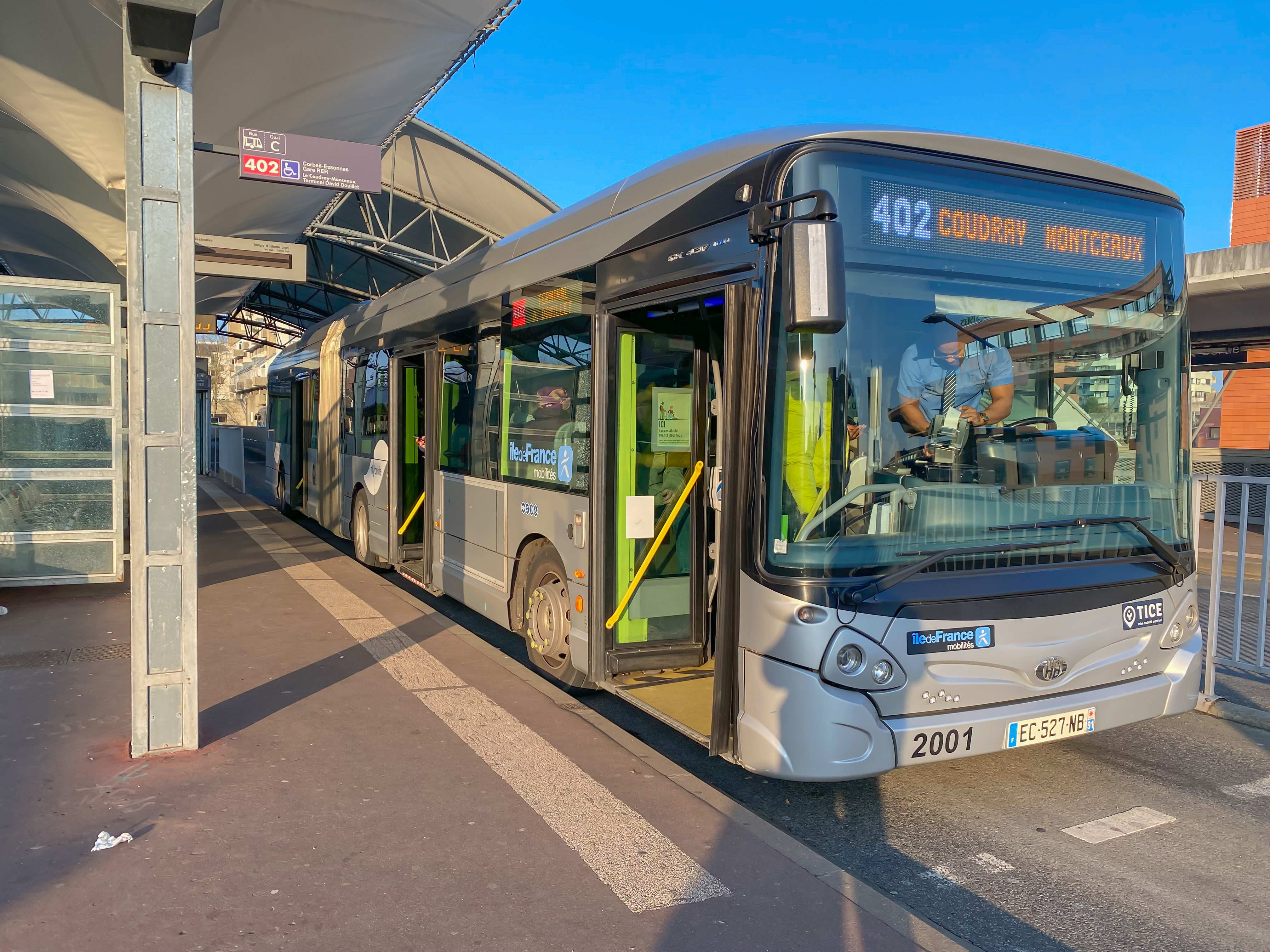 Gare routière d'Évry-Courcouronnes accolée à la gare ferroviaire d'Évry-Courcouronnes (côté ouest - niveau 1)